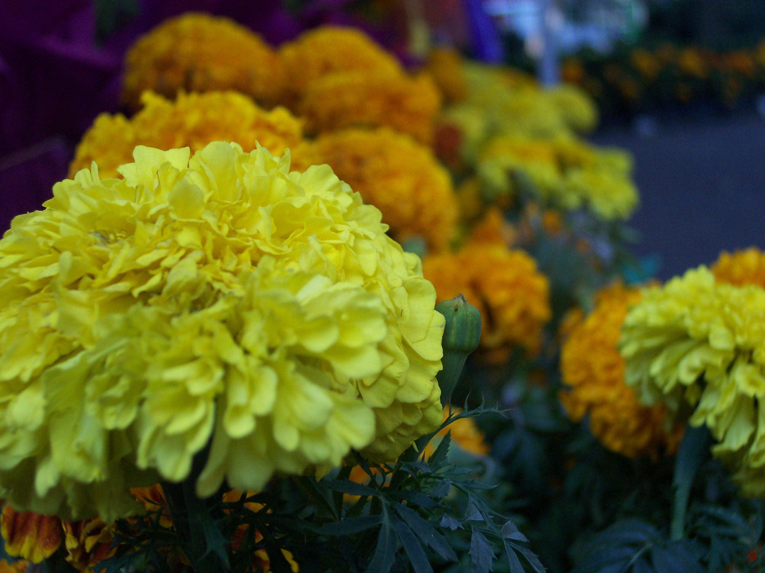 La flor principal de la celebración es el cempazúchitl Photo taken in Xochimilco, D. F. Mexico. November the 2nd, Day of Deads, a tradicional celebration in Mexico. SPANISH: Fotos tomadas en Xochimilco con motivo del día de muertos (2 de Noviembre) año 2006.